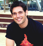 Fotografía de Josep Lobató Pérez